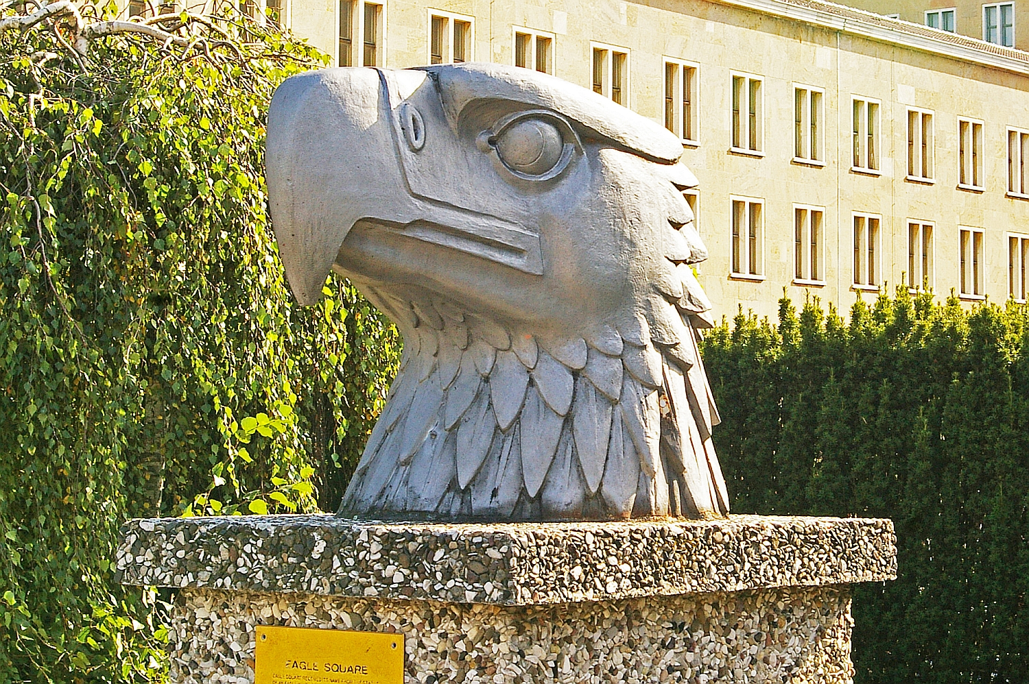 Adlerkopf der von Ernst Sagebiel entworfenen Statue für den Flughafen Tempelhof